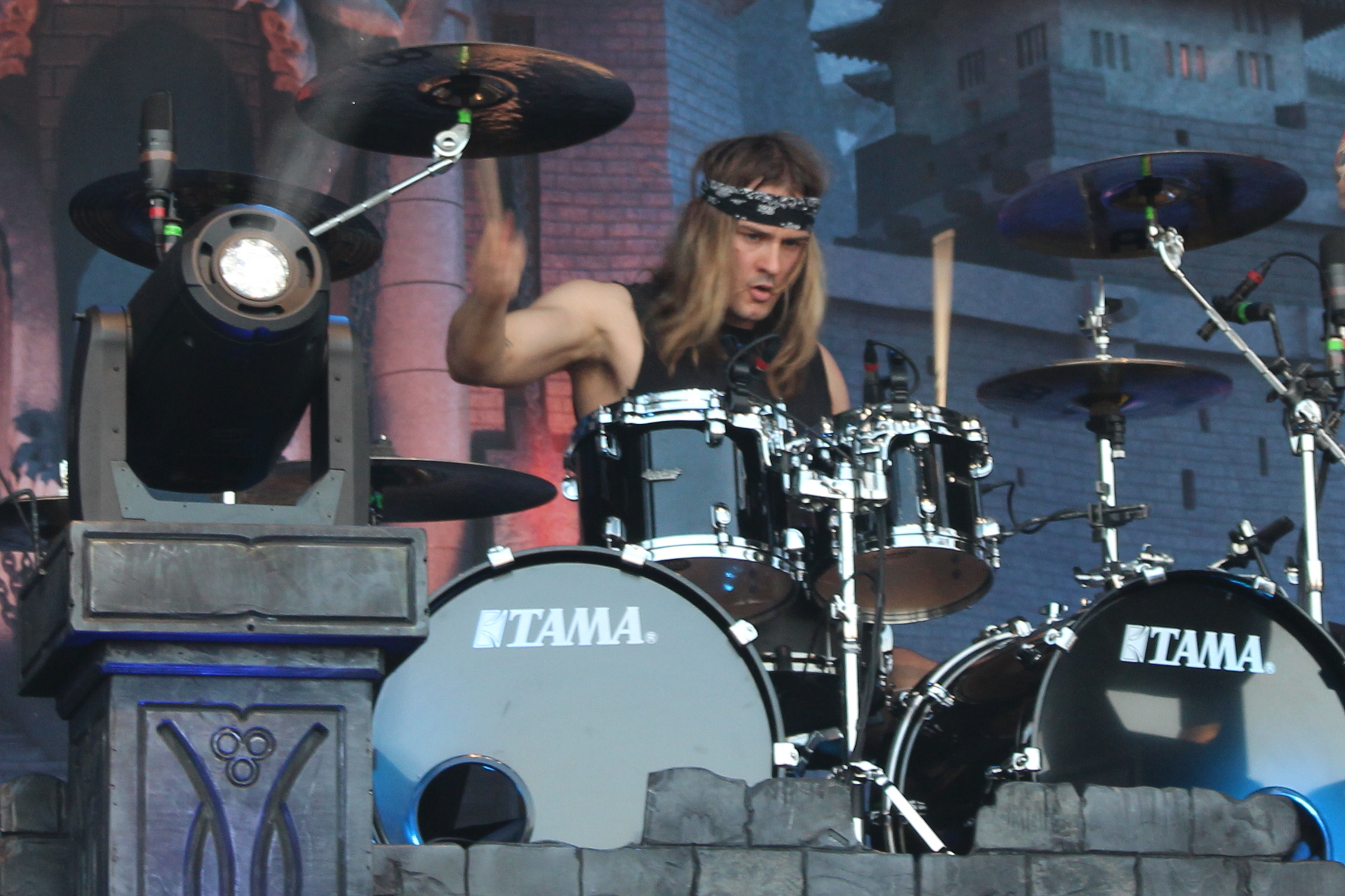 Festivalsommer This photo was created with the support of donations to Wikimedia Deutschland in the context of the CPB project "Festival Summer". Personality rights warningAlthough this work is freely licensed or in the public domain, the person(s) shown may have rights that legally restrict certain re-uses unless those depicted consent to such uses. In these cases, a model release or other evidence of consent could protect you from infringement claims.